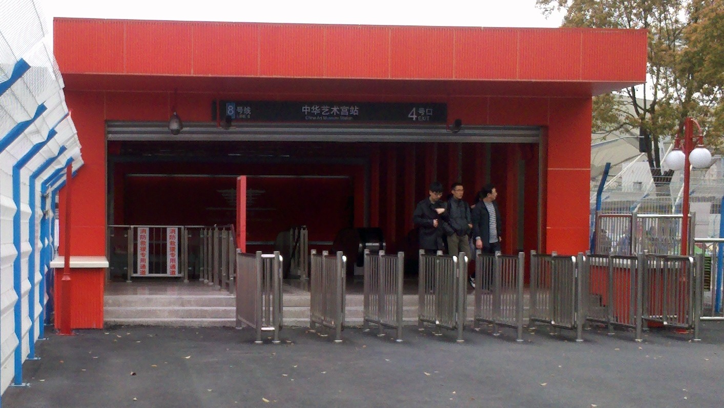 中华艺术宫站